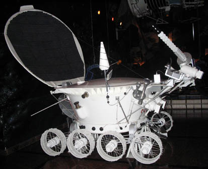 Музей С.П.Корольова в м. Житомир, Місяцехід